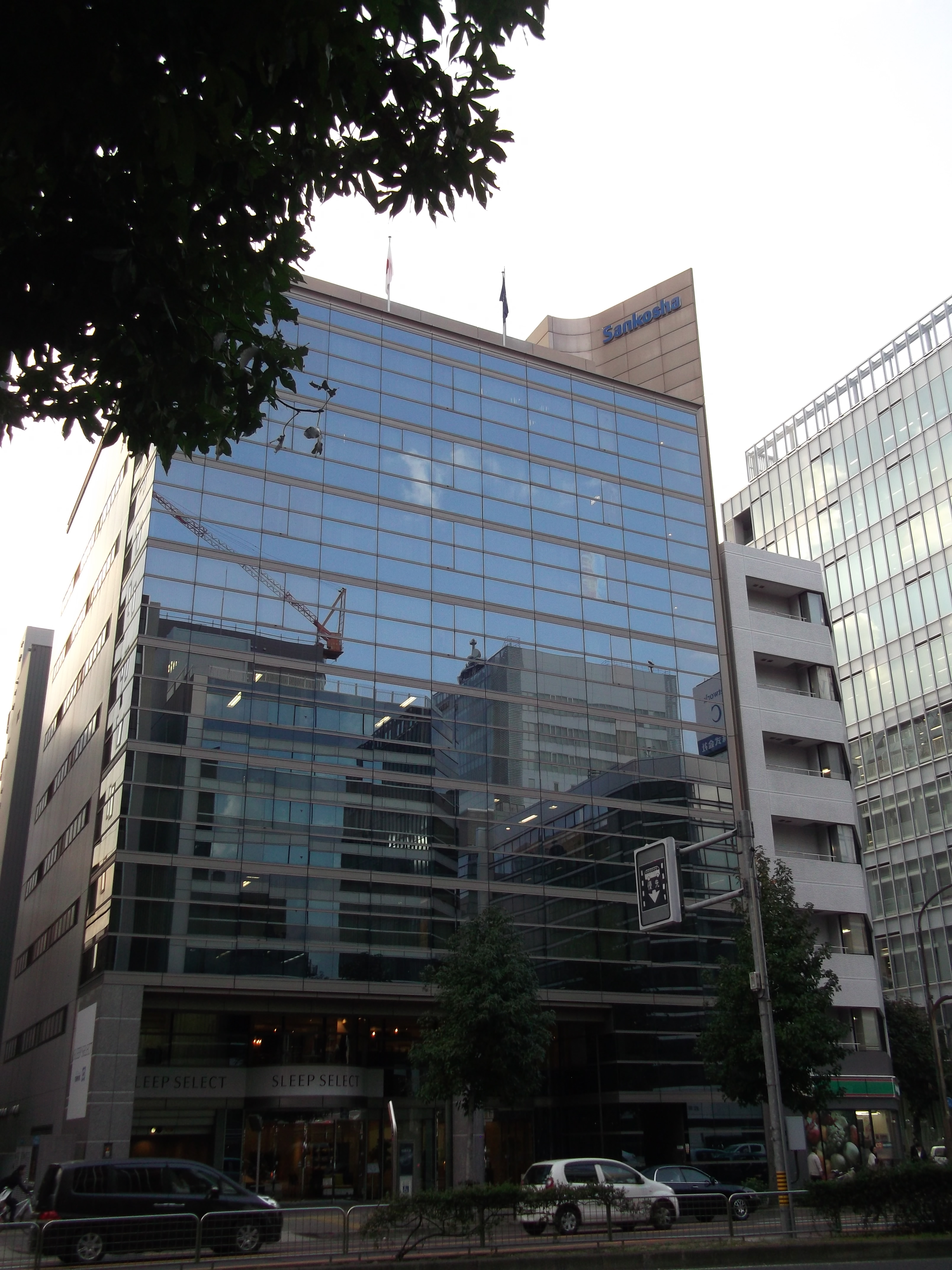 名古屋市中区丸の内三丁目の三晃社本社を東側公道南側より撮影